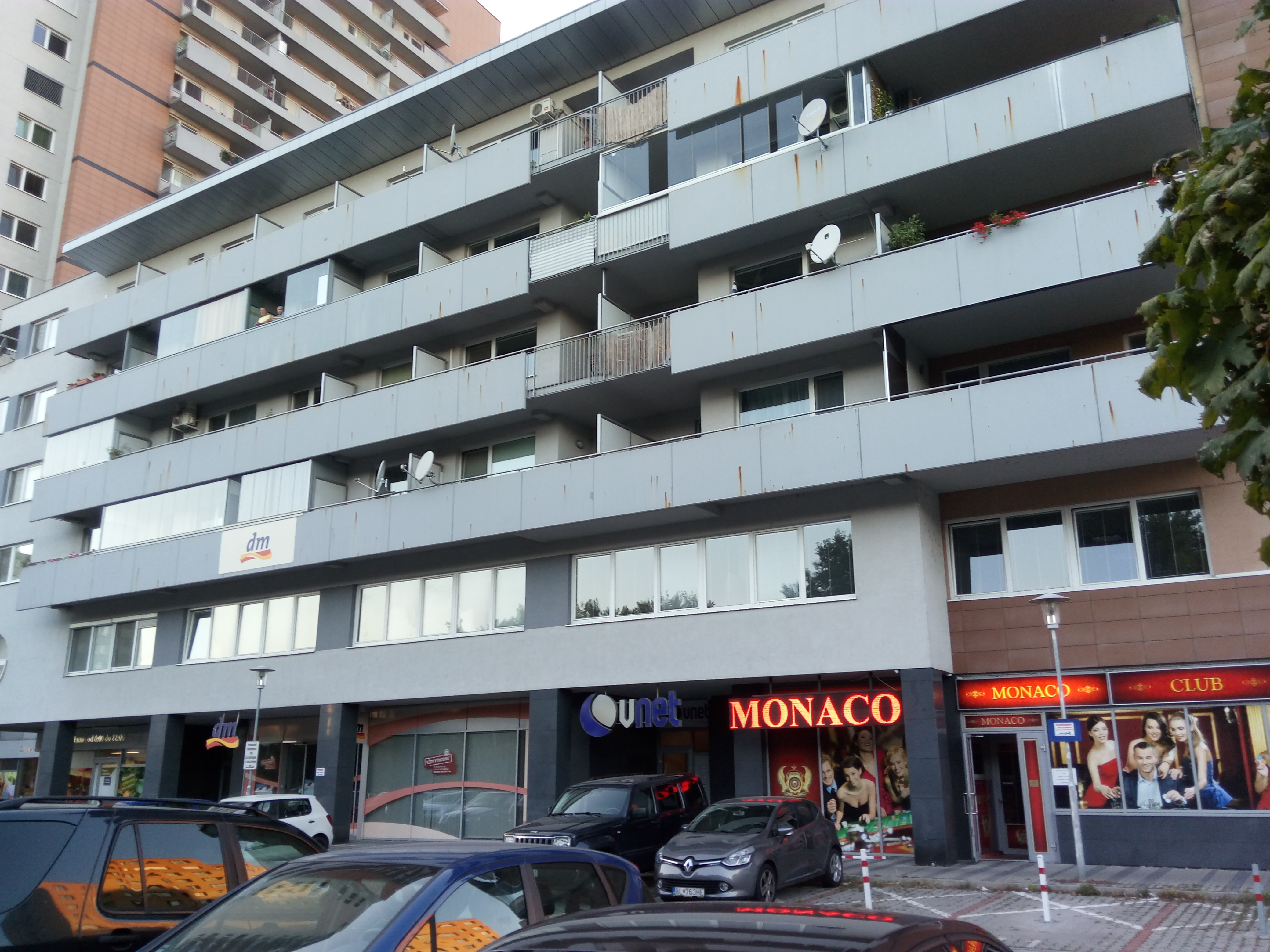 Námestie hraničiarov 39, Petržalka, Bratislava